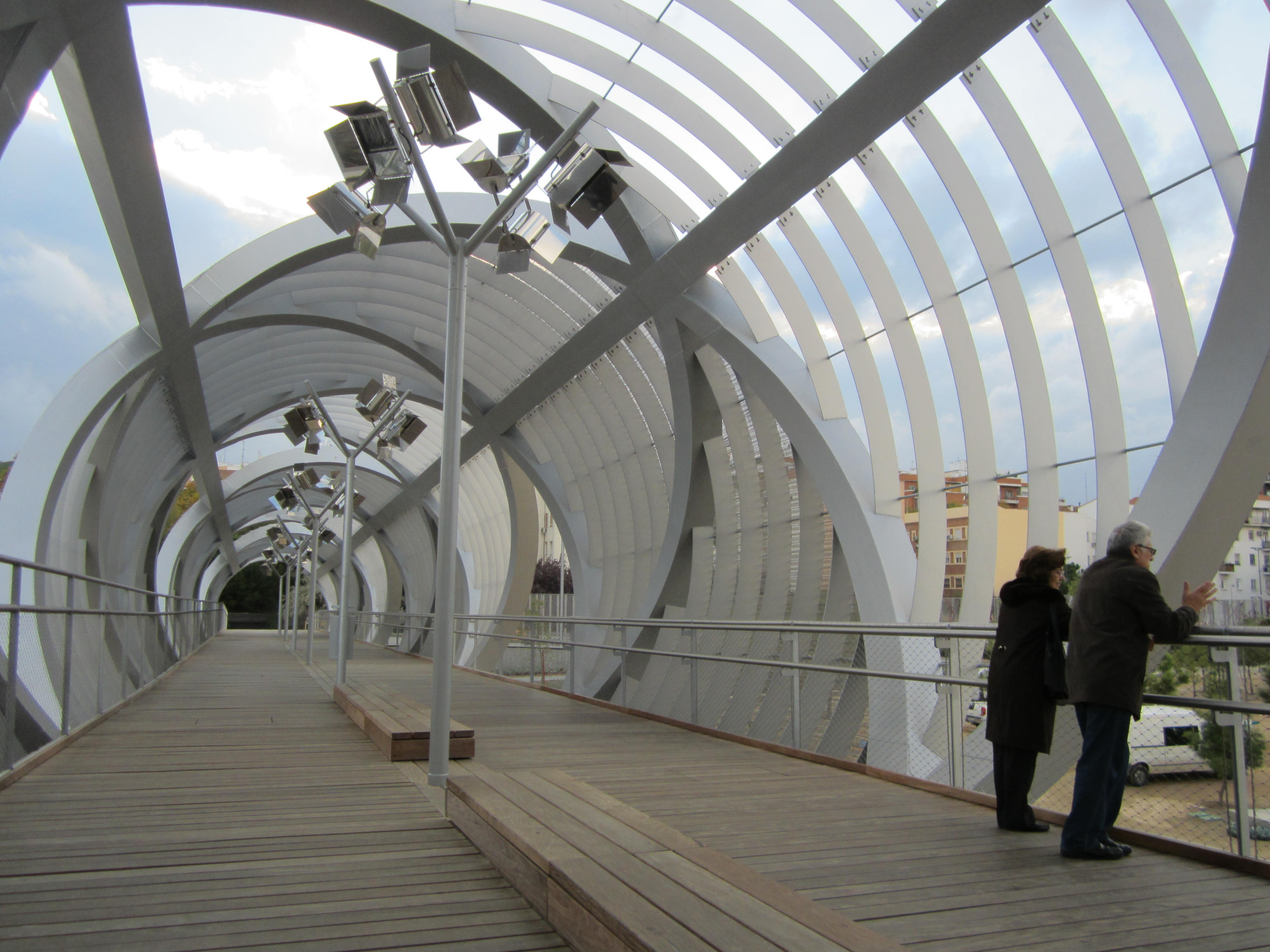 Arganzuela Footbridge